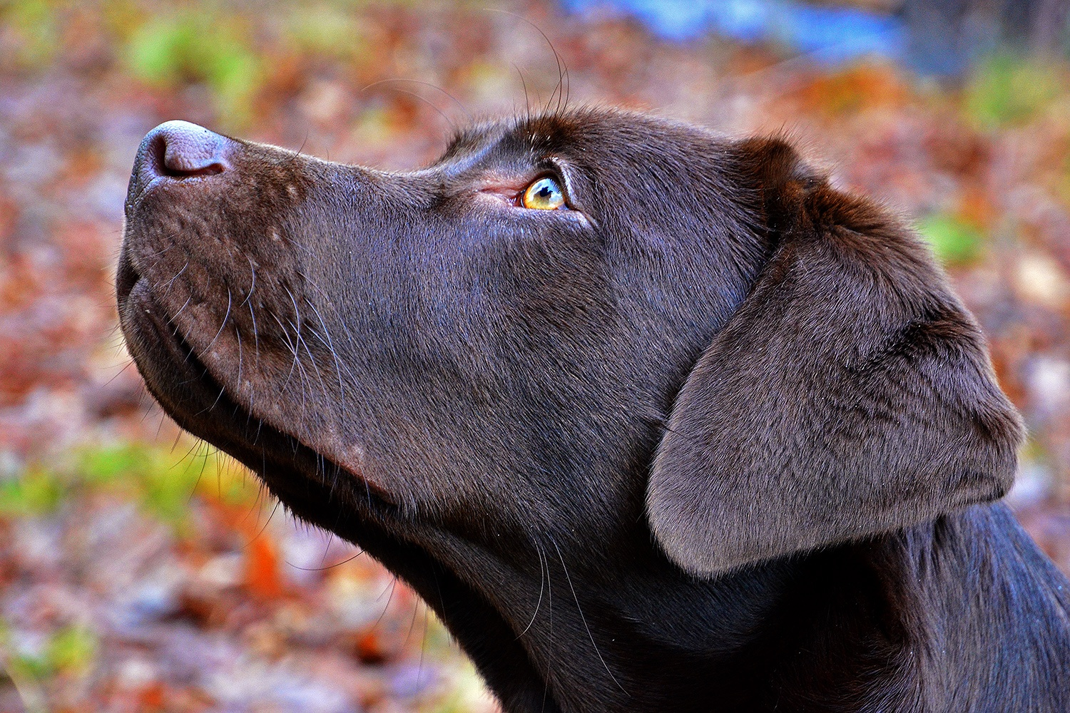 Labrador Retriever (Schoko Labbi), Datum/Uhrzeit: 30.12.2012 11:30:52